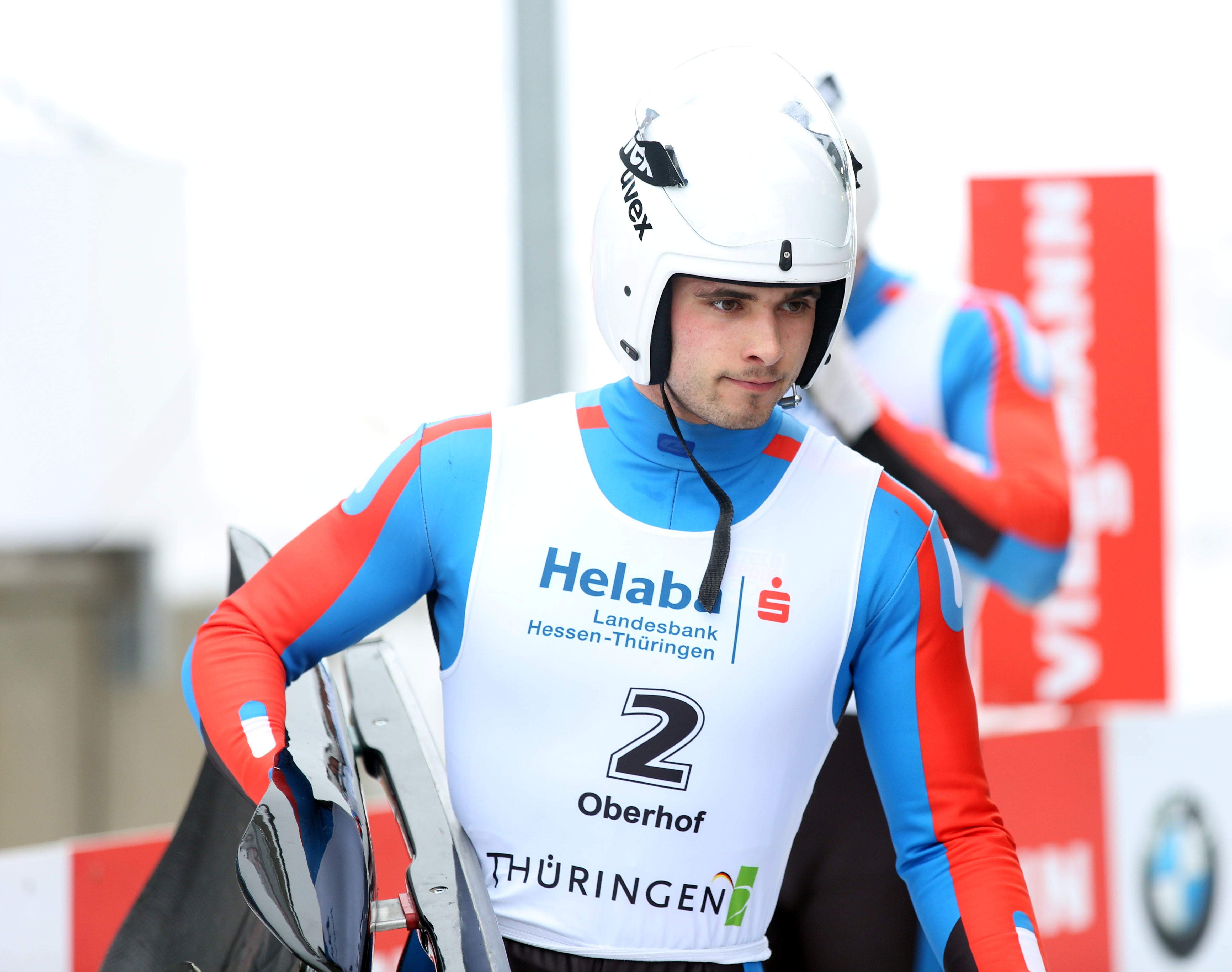 Antonin Broz beim HELABA Nationscup der Doppelsitzer in Oberhof 2017